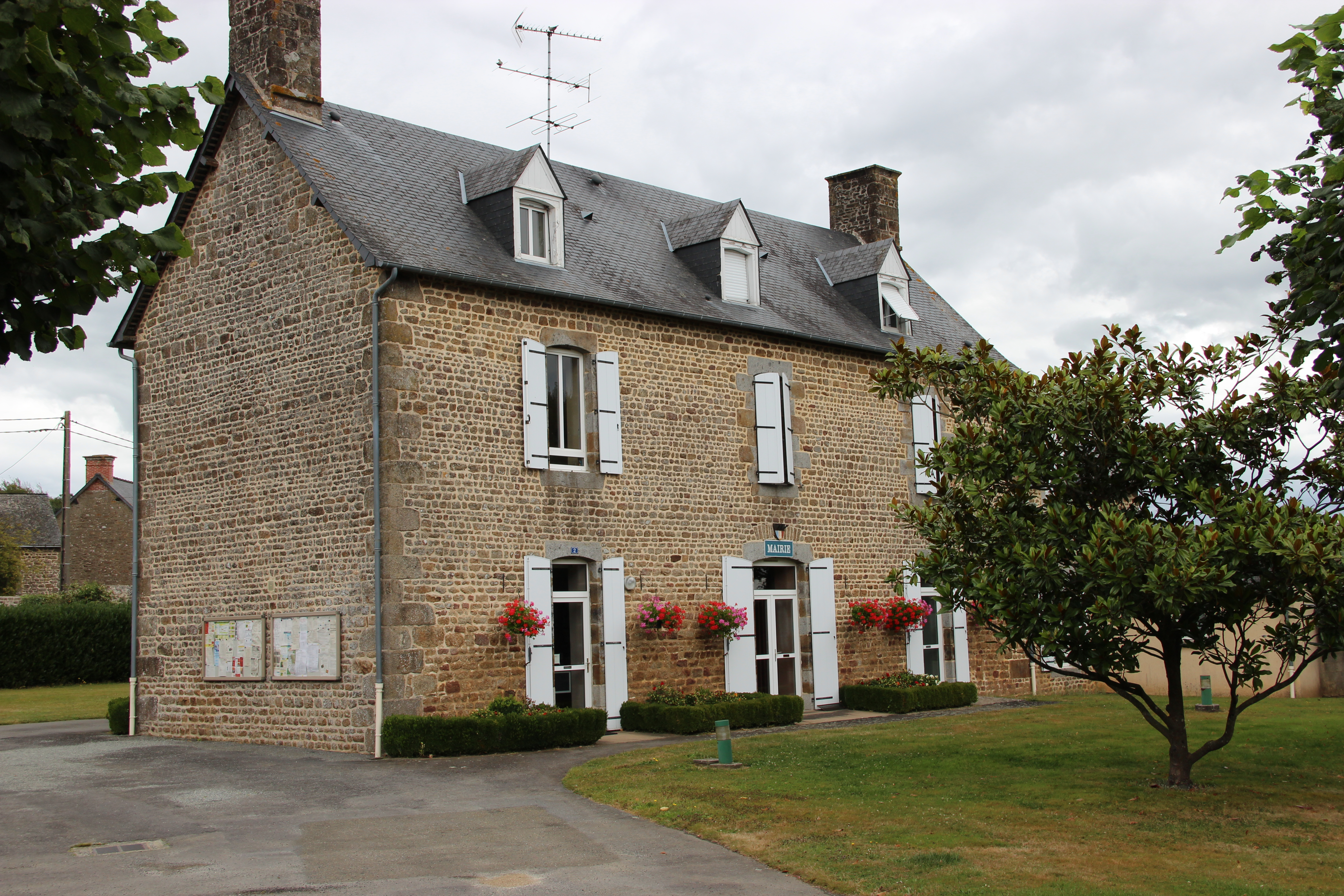 Mairie de La Pellerine.